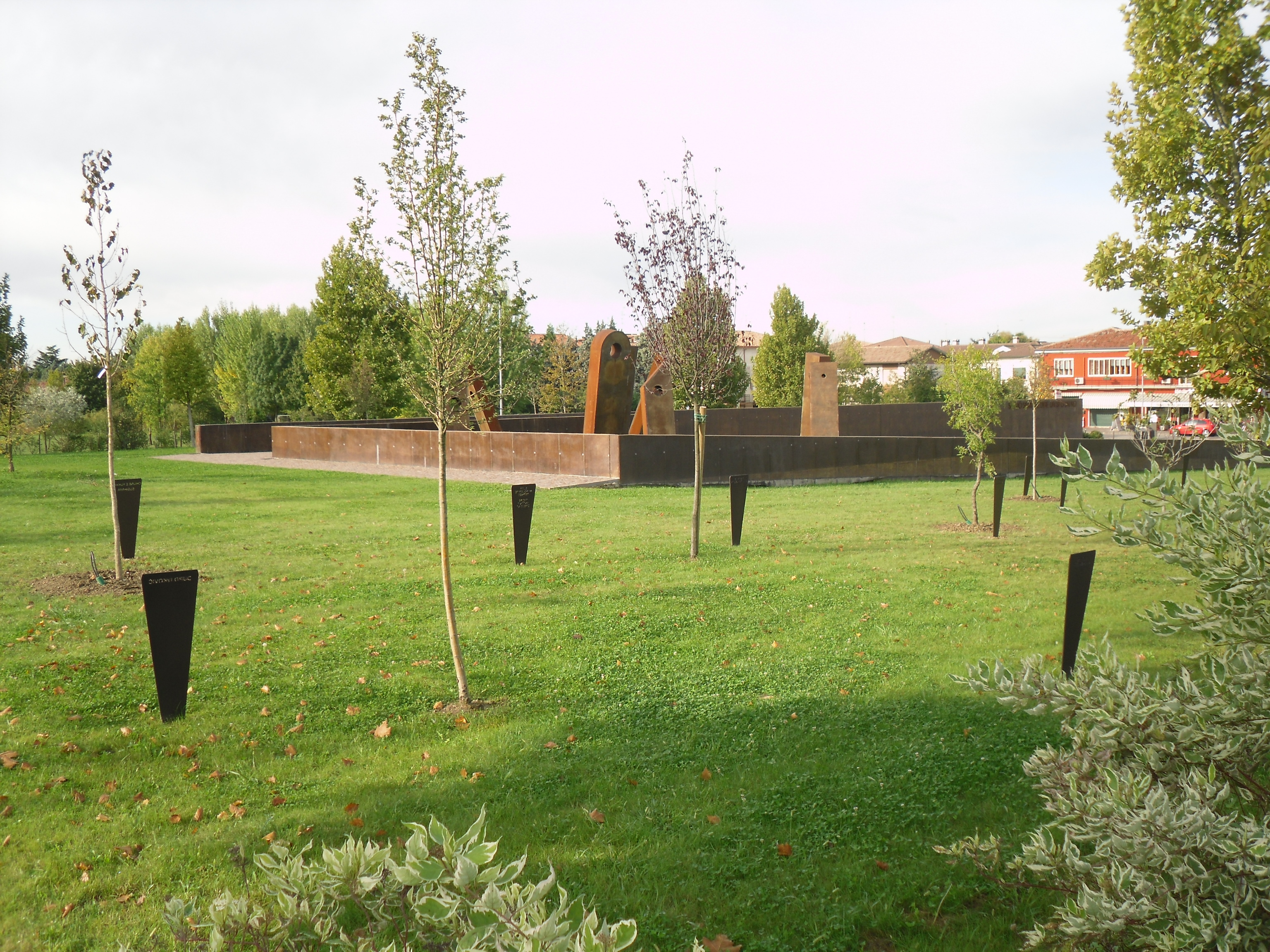 Giardino dei Giusti del Mondo di Padova. Panorama.